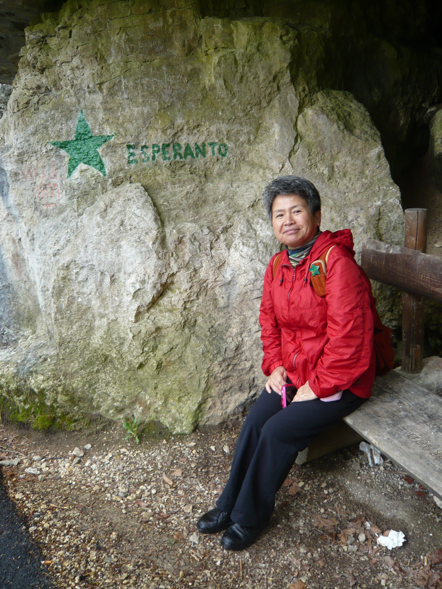 Route reliant Les Brenets au Saut-du-Doubs, Suisse